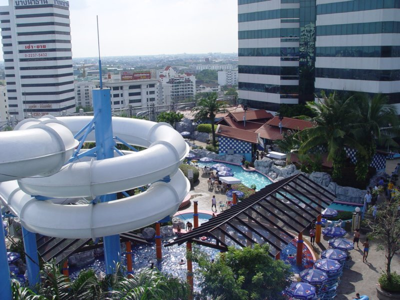 Central Bang Na, Bangkok, Thailand